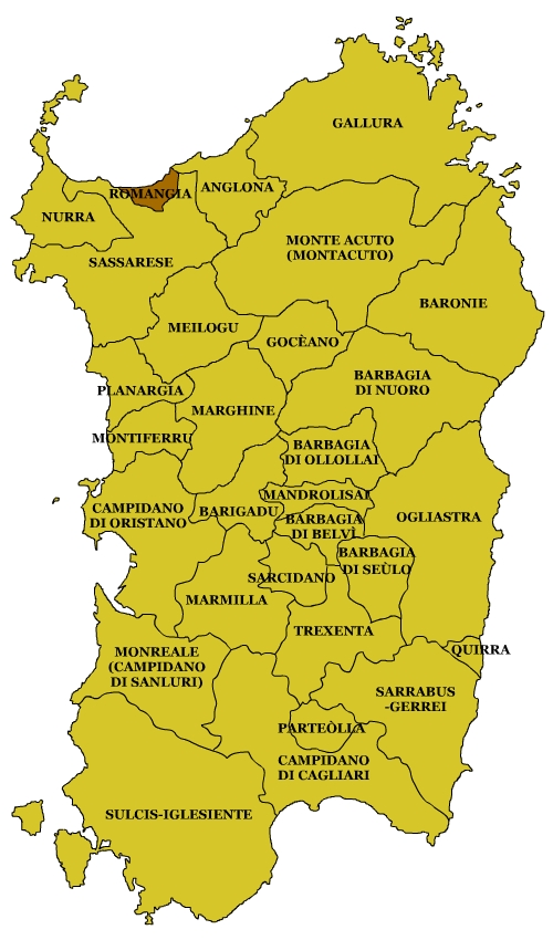 Sardinian Subregions